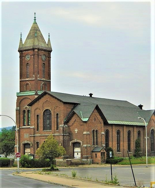 Gloversville, New York